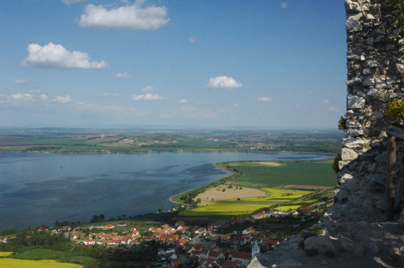 Dívčí hrady, CHKO Pálava